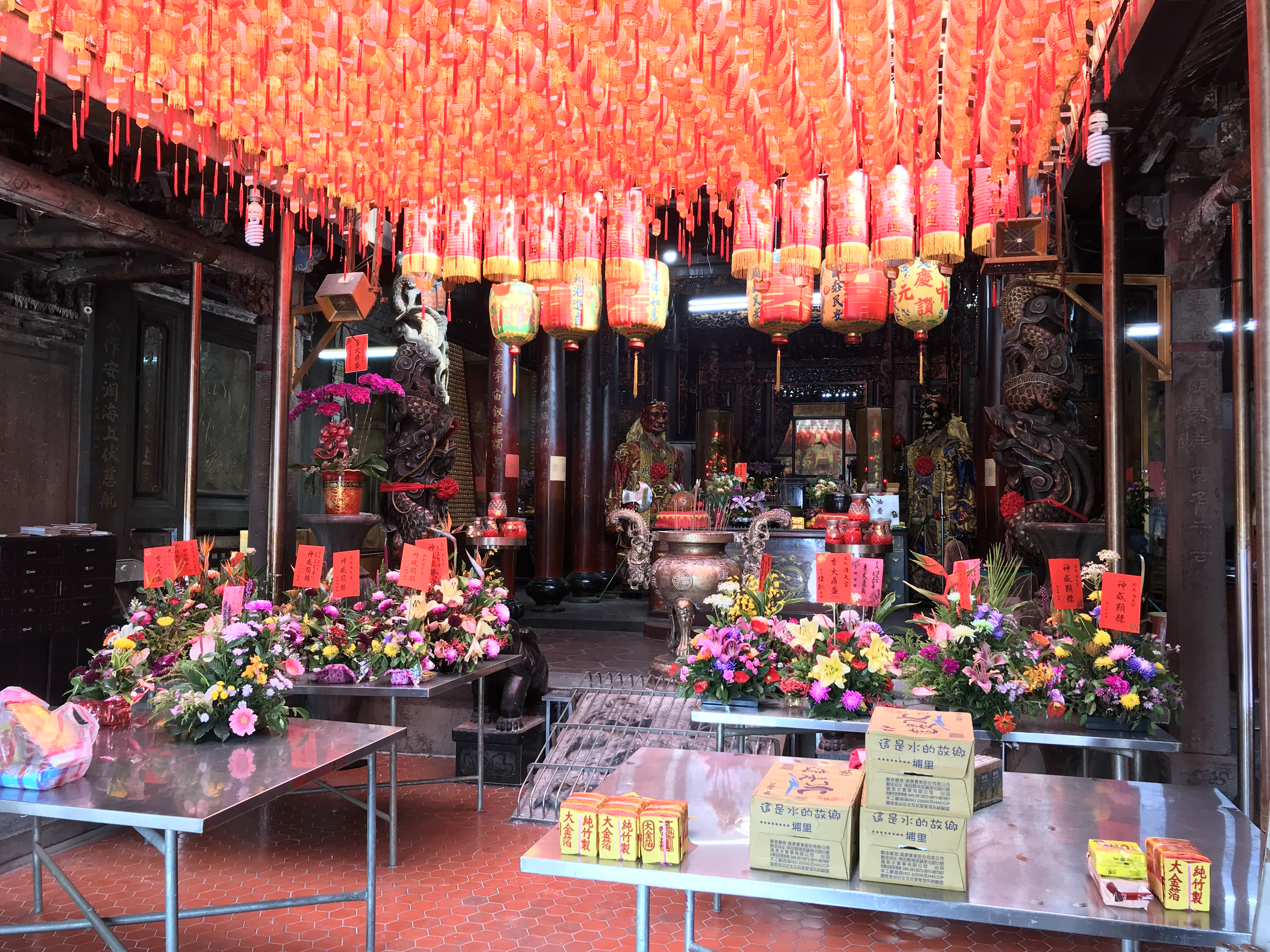 中文（台灣）: 大庄浩天宮殿內